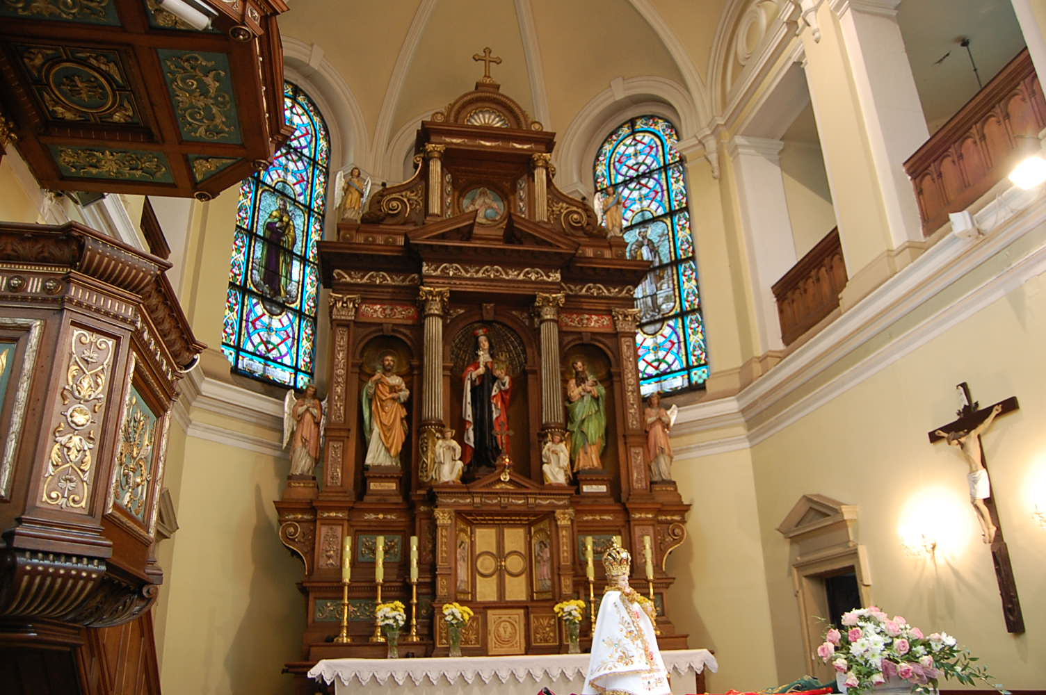 Kostel sv. Hedviky v Doubravě, interiér, hlavní oltář. Noc kostelů 2015.